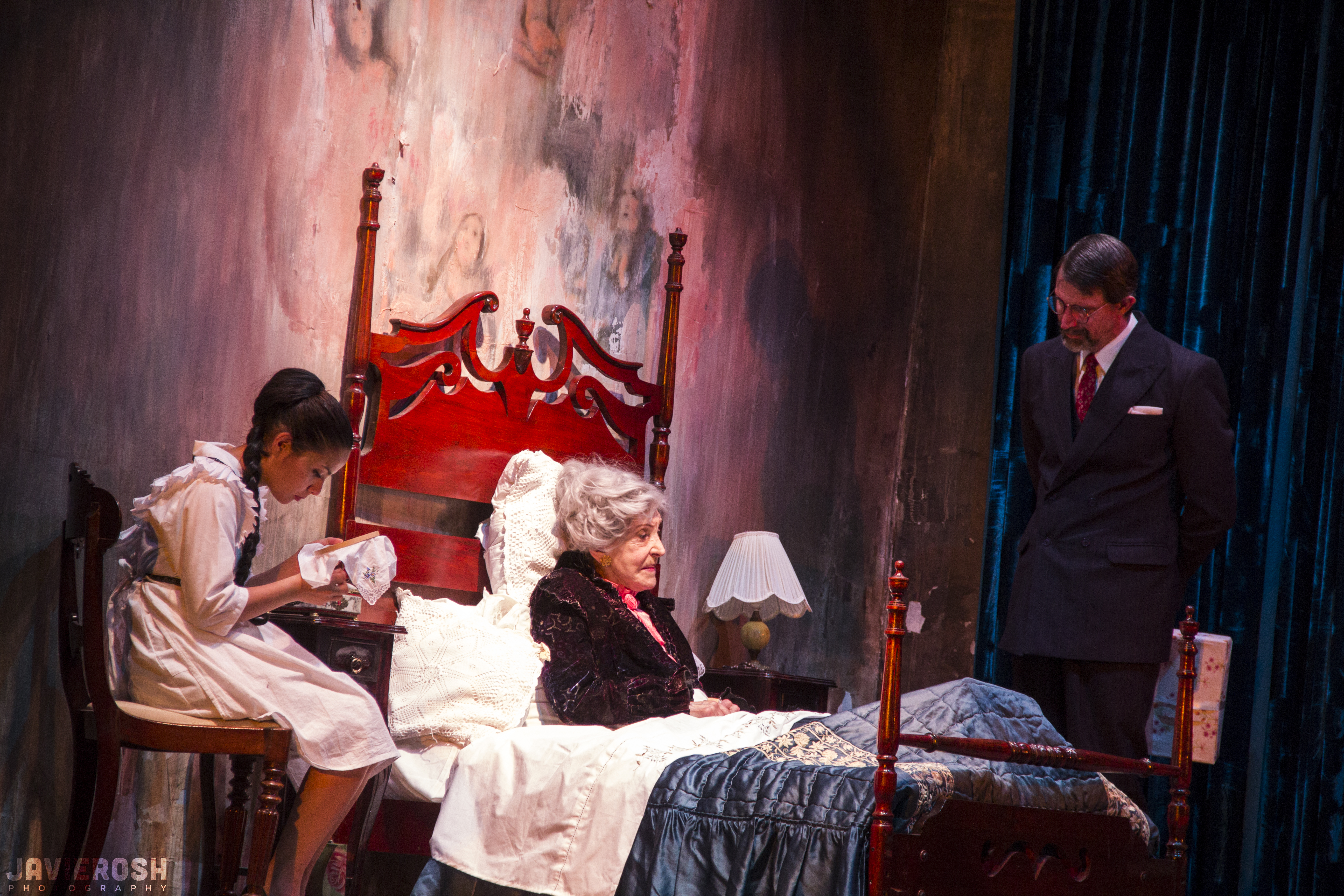 Coronacion en el GAM. @GAM 10.11.13 Nelly Meruane como Misia Elisa, Francisco Melo en el papel de su nieto, Andrés.